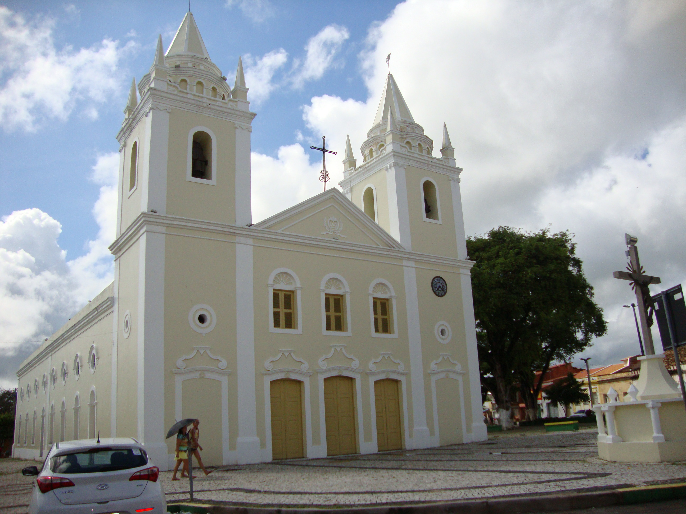 Igreja Matriz de Cascavel - CE, Brasil.